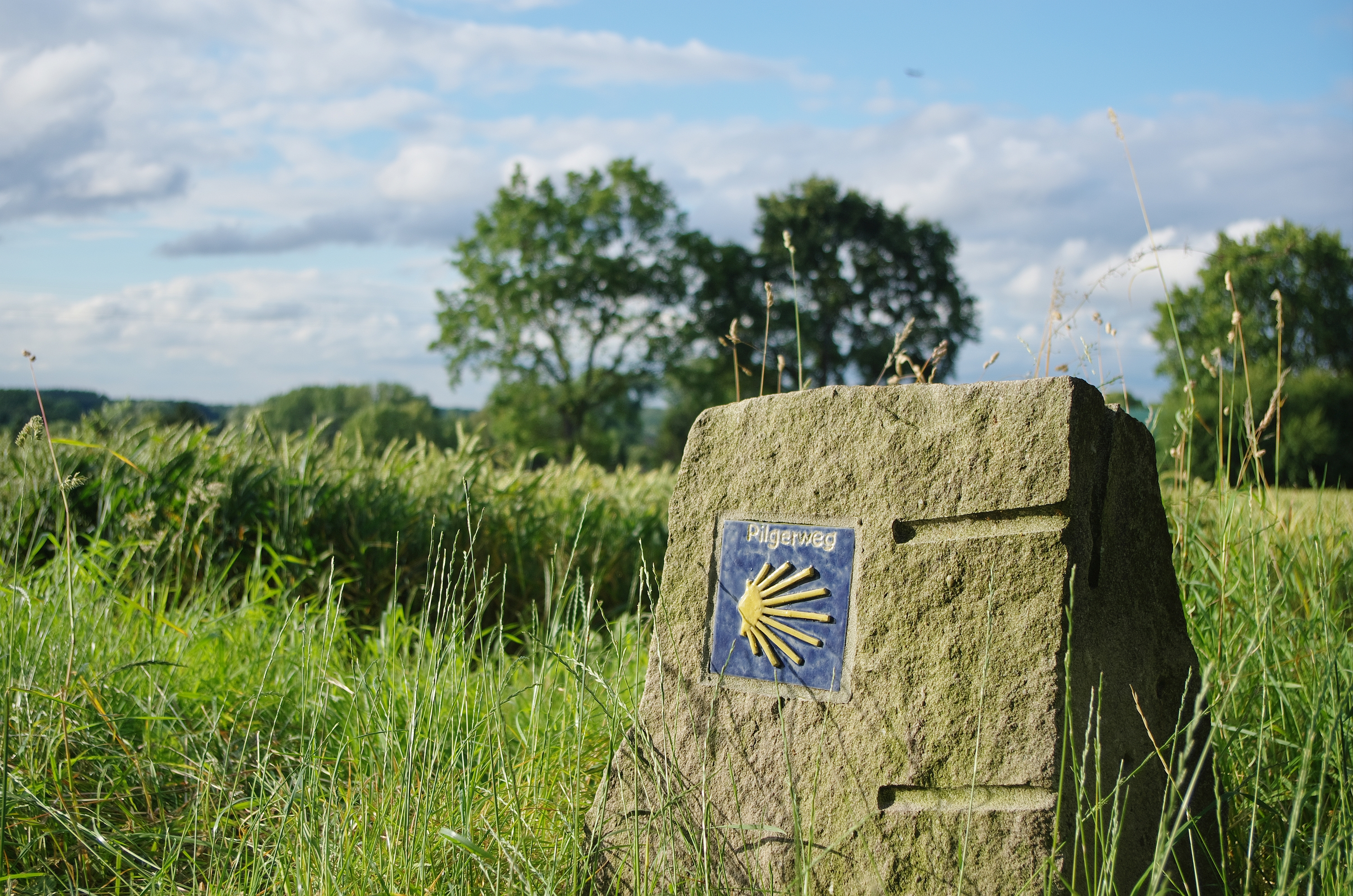 Wegemarkierung für den Jakobsweg nahe der Bahnstrecke zwischen Unna-Uelzen und Unna-Mühlhausen